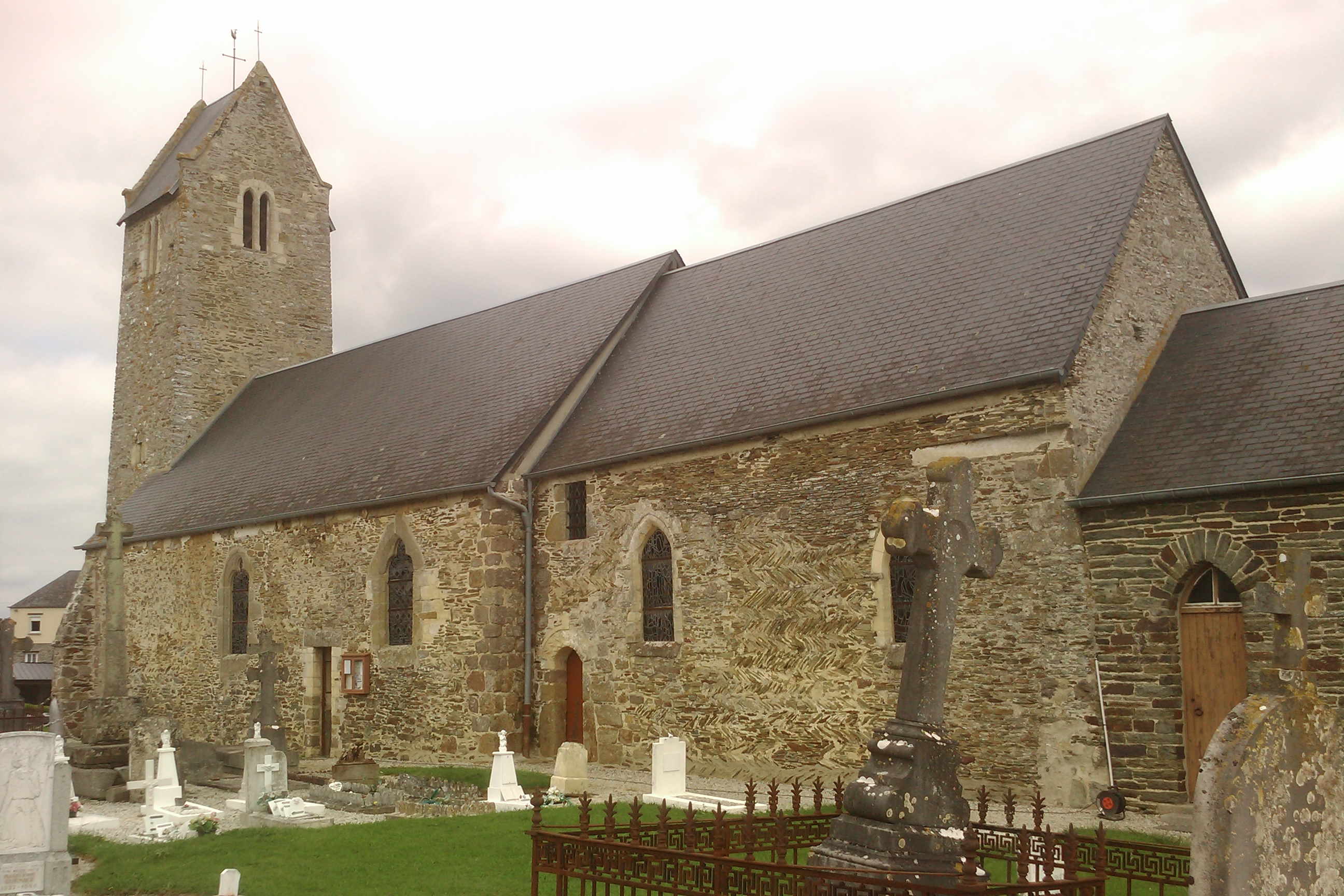 Eglise Saint-Jean-Baptiste de la Mancellière-sur-Vire De nombreuses assises d'appareil en arête-de-poisson sont visibles sur les murs gouttereaux du chevet. .